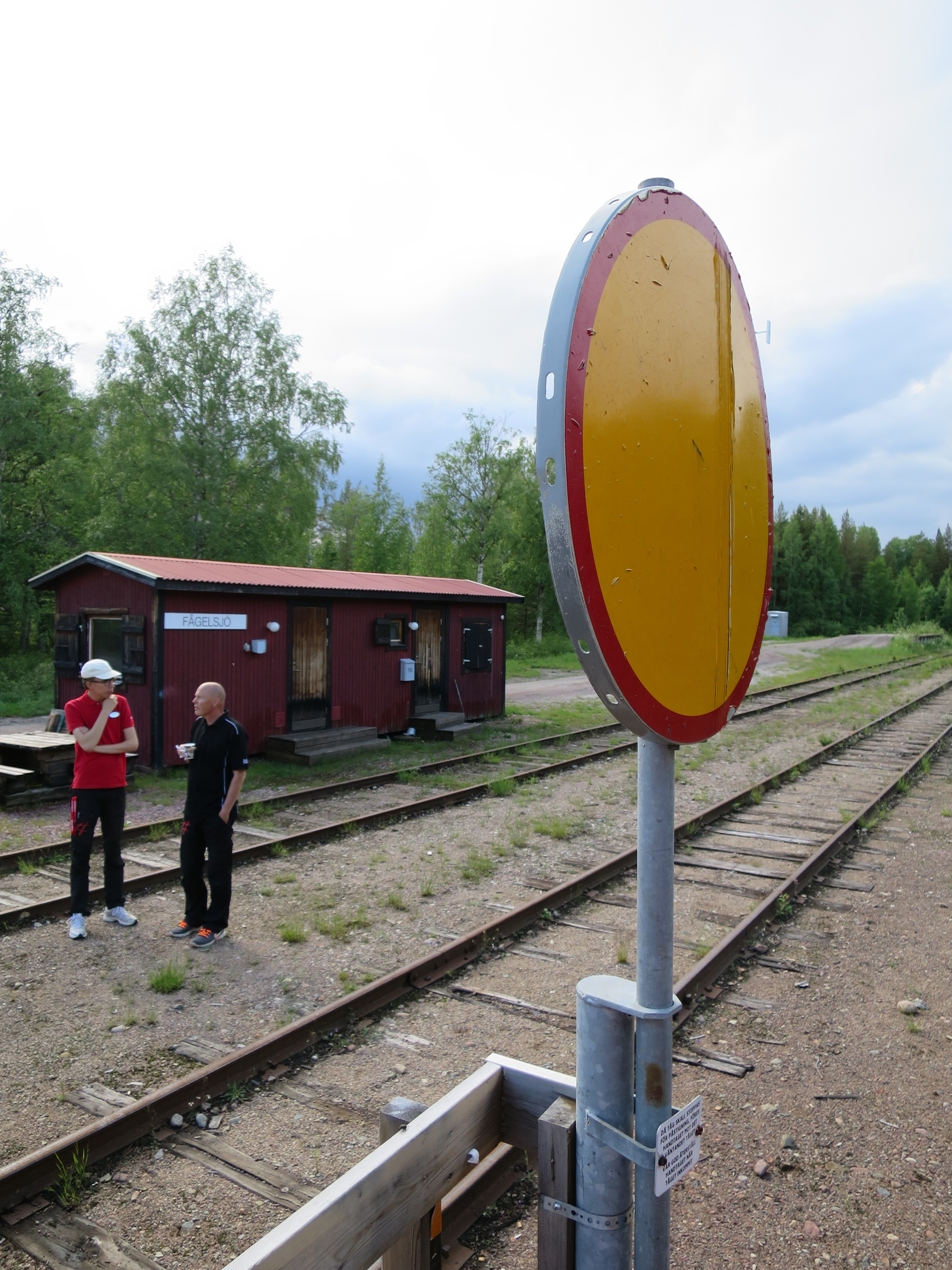 Rly-signal for "Stop om request", Fågelsjö Station, Inlandsbanan, Sweden